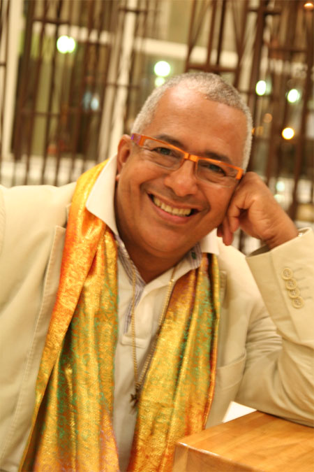 Rubén cedeño